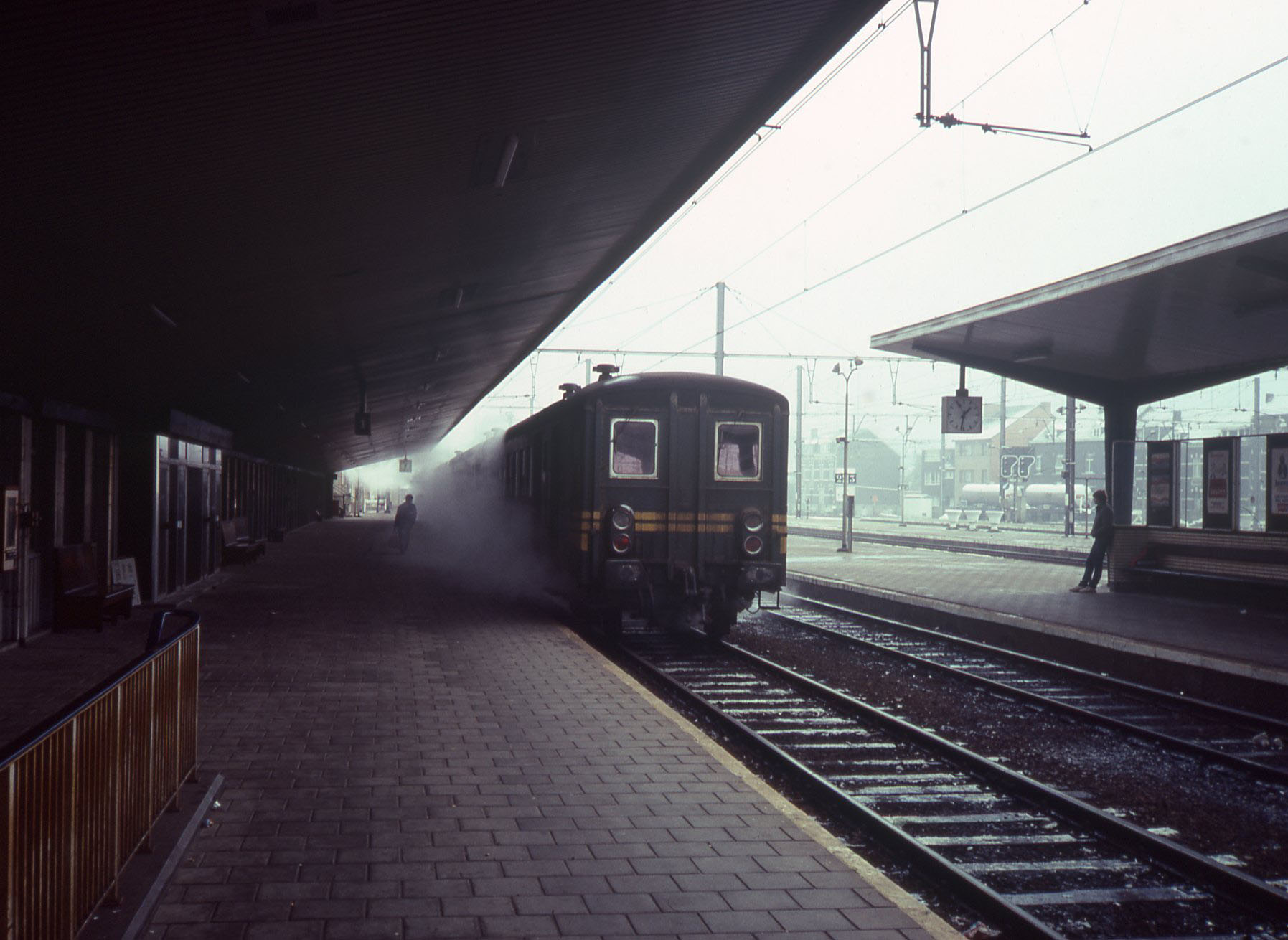 De trein naar Mol die toen nog met oud stoomverwarmde rijtuigen werd gereden.